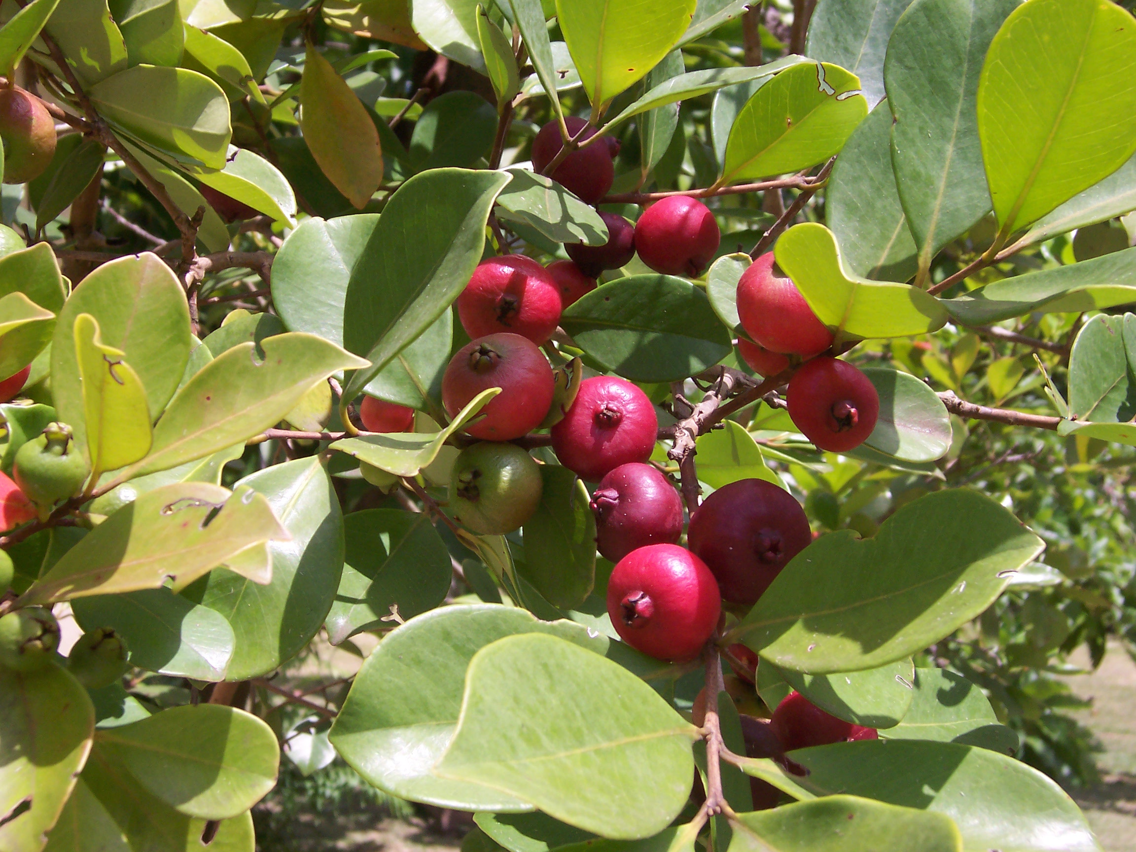 goyavier-fraise (Psidium cattleyanum) - fruits Photo: B.navez - 24 FEB 2006 - Réunion island